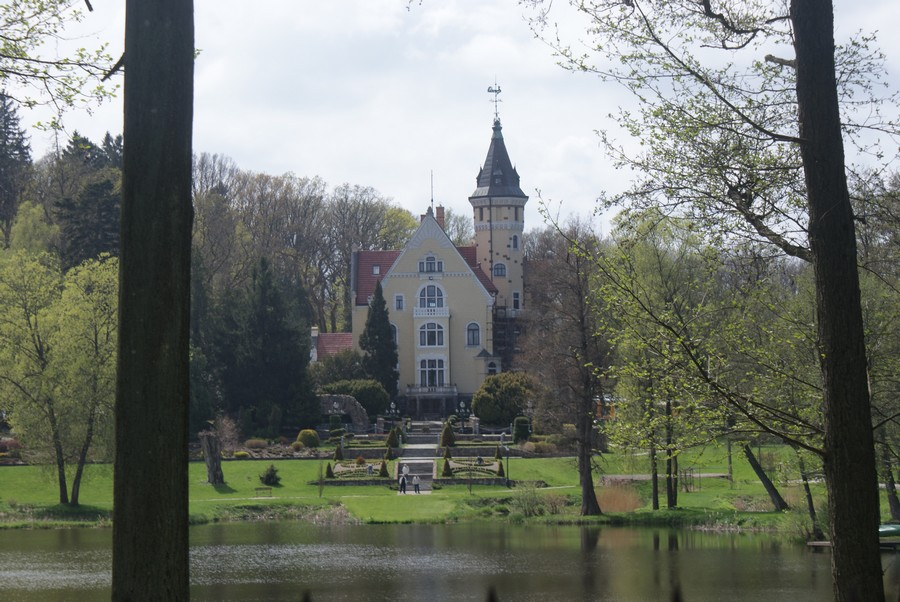 Pałac bursztynowy w Strzekęcinie